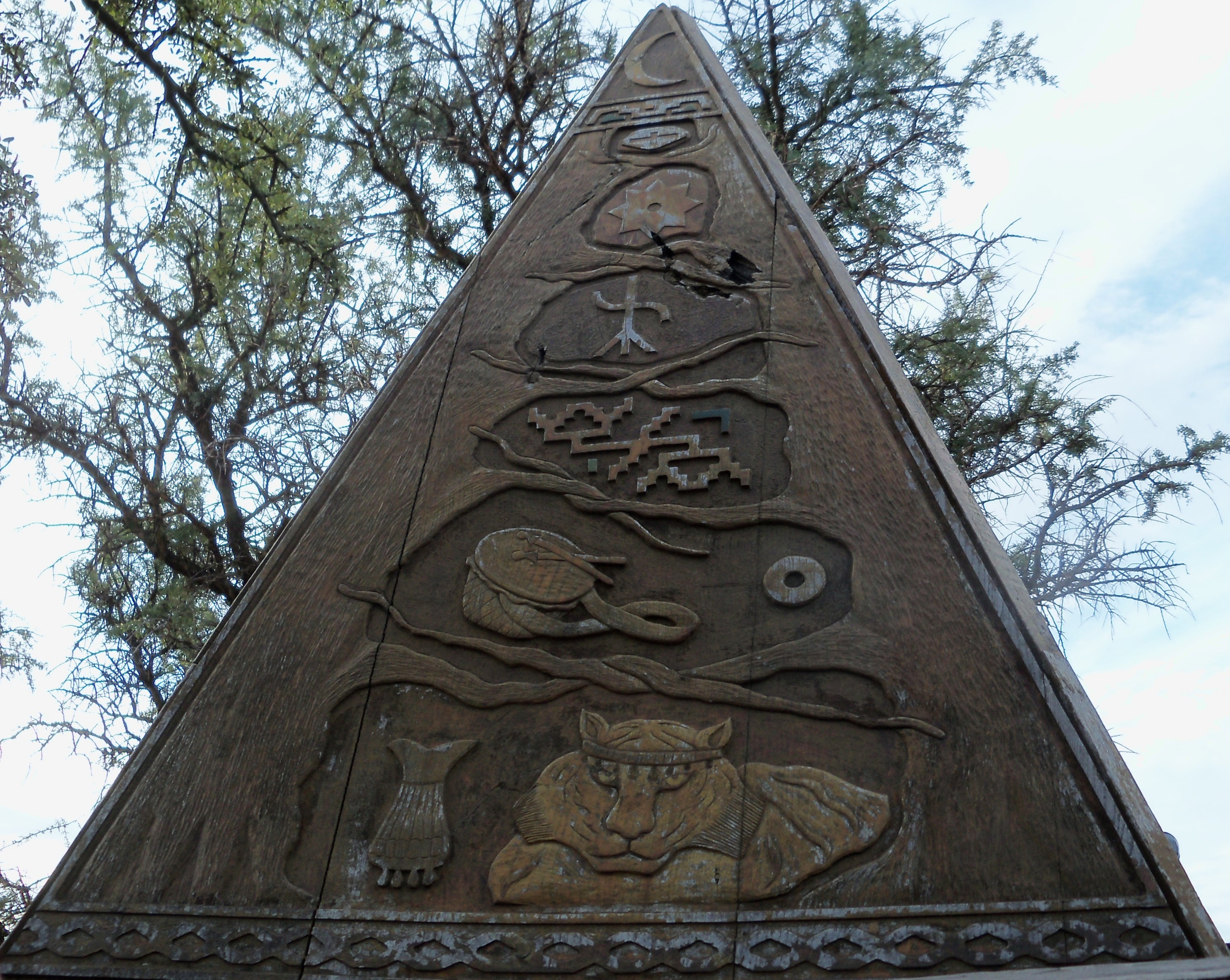 enterratorio del Cacique M. Rosas en Victorica La Pampa Argentina